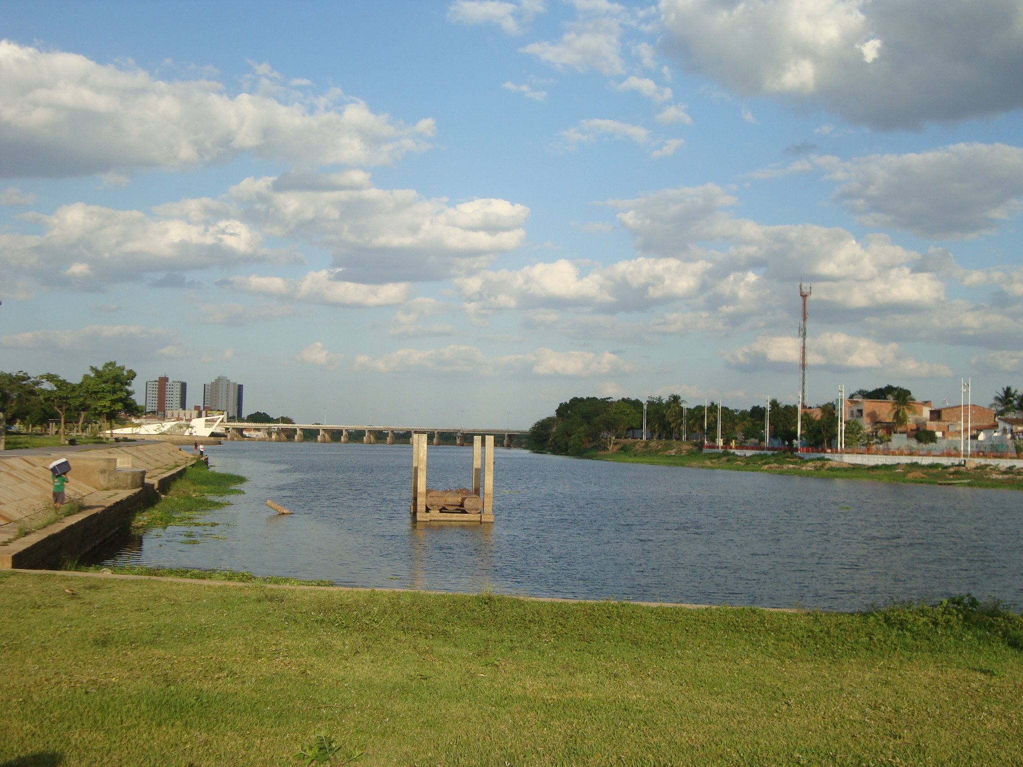 Rio Acaraú Sobral-CE